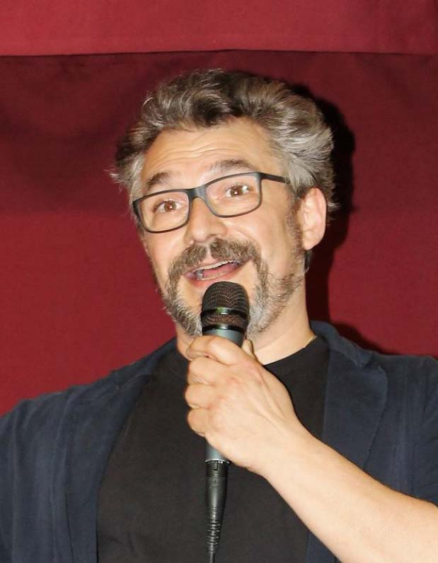 Alessio Tagliento al Bistrò del Teatro di Milano , Maggio 2018